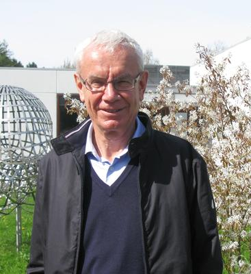 Foto di Boris Anatoljewitsch Dubrowin